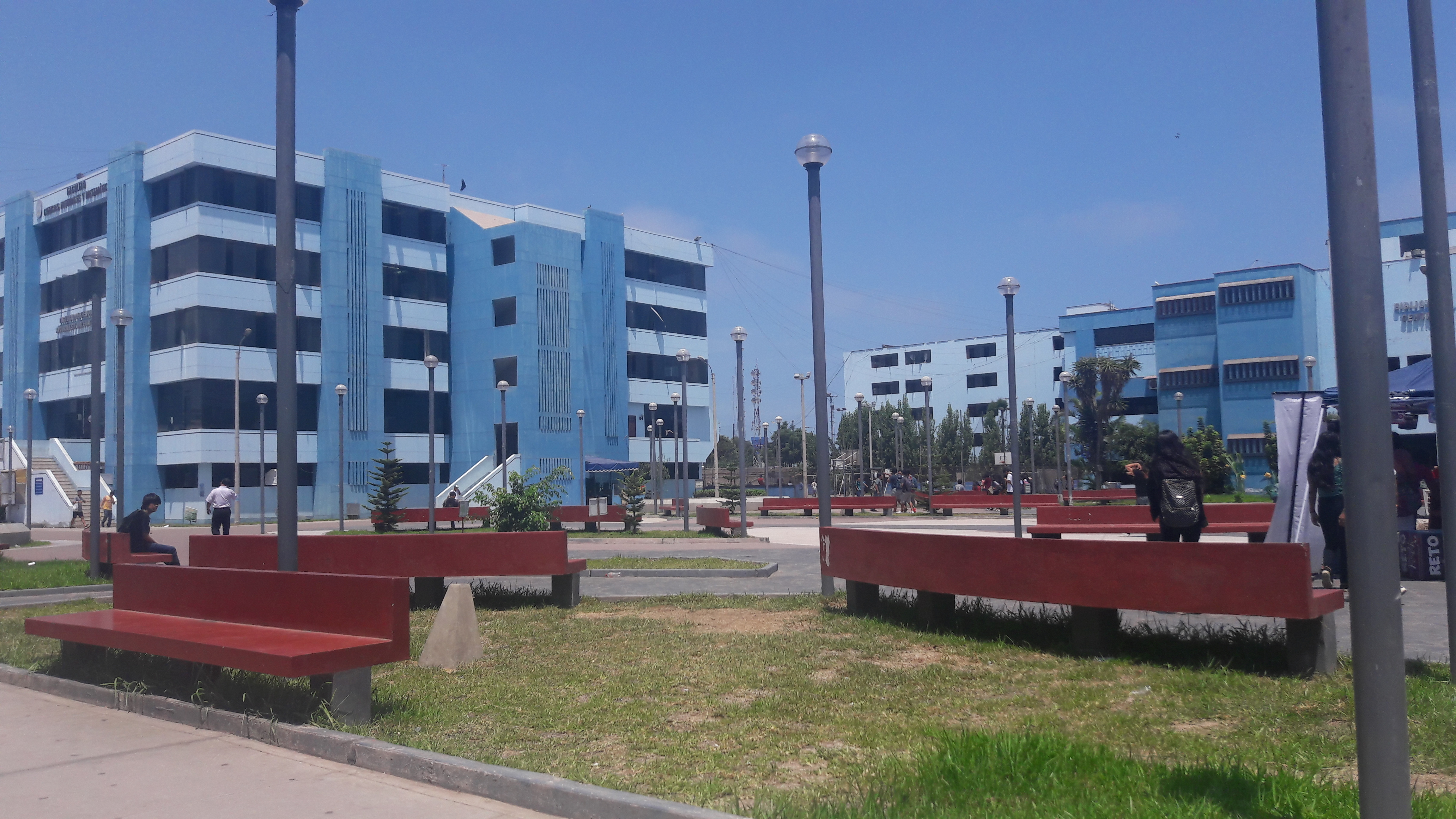 UNAC-Plaza Cívica Universitario